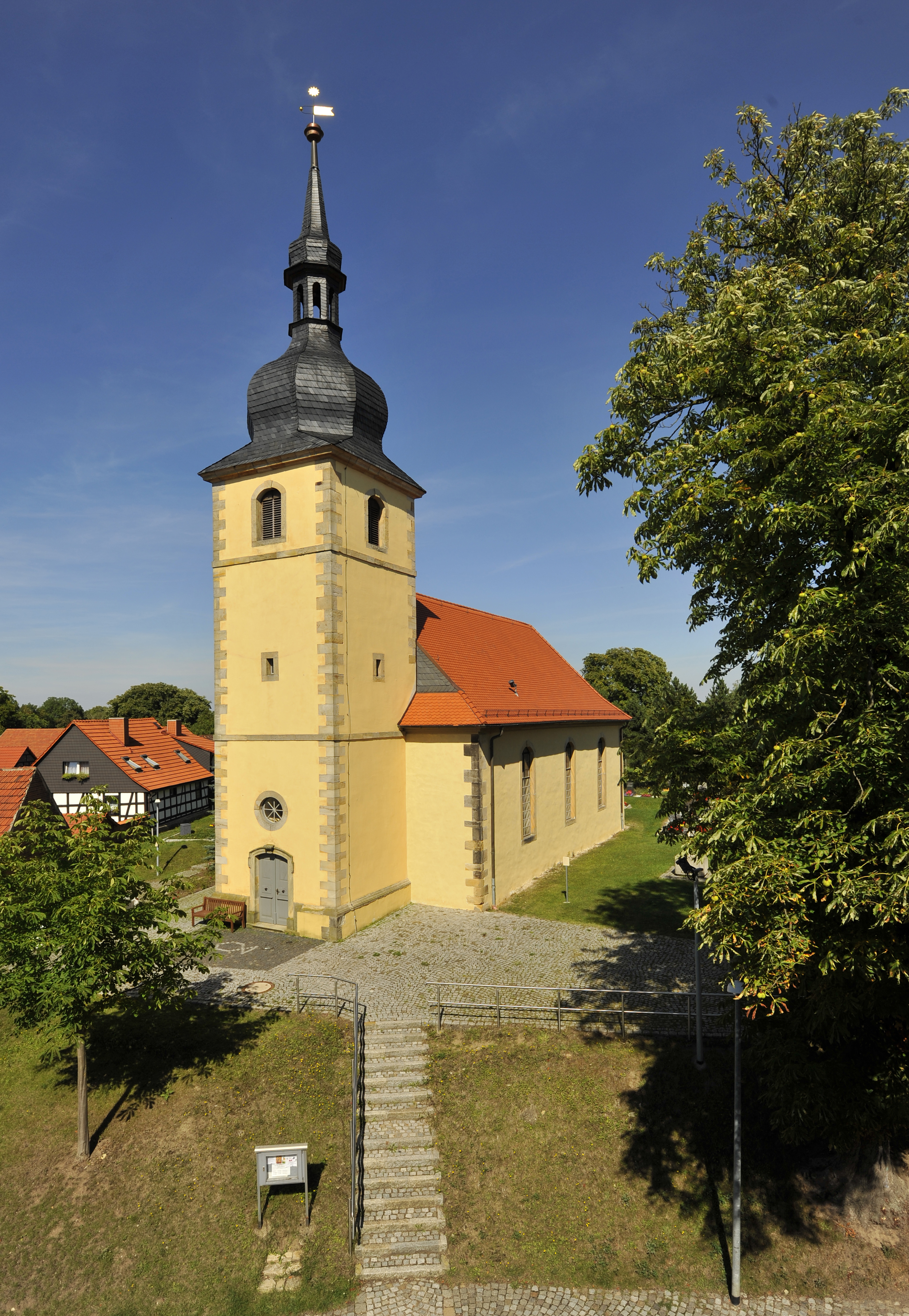 St. Dionysiuskirche Salomonsborn